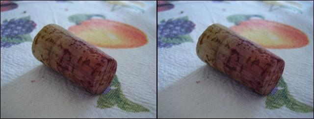 Tipica Immagine Stereoscopica Affiancata